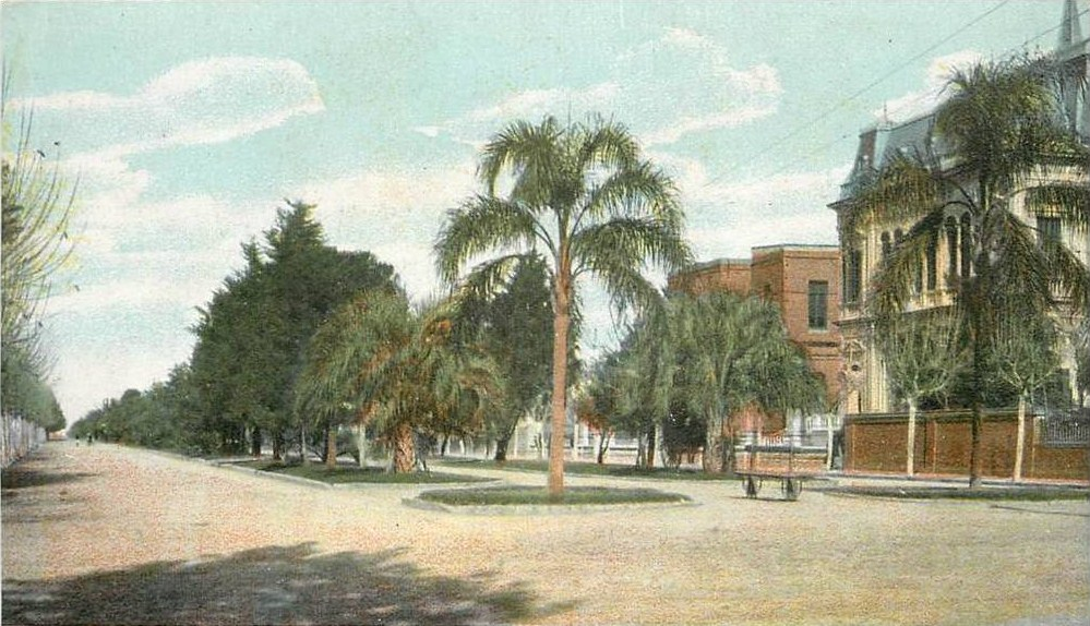 Vista del Boulevard Santafesino de Rosario, Argentina, a principios del siglo XX. Hoy Boulevard Oroño.